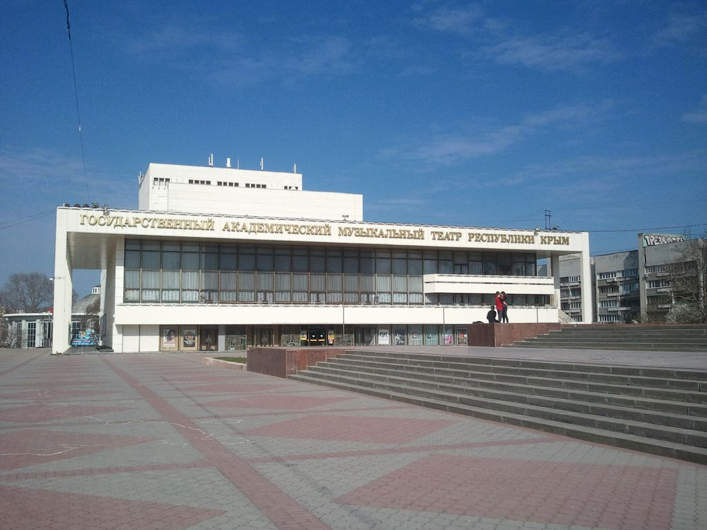 Симферополь. Площадь Ленина. Музыкальный Театр